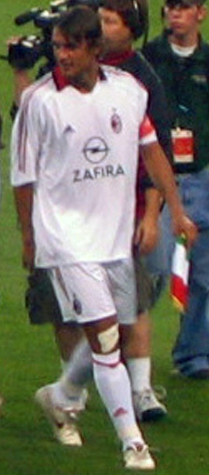 Paolo Maldini